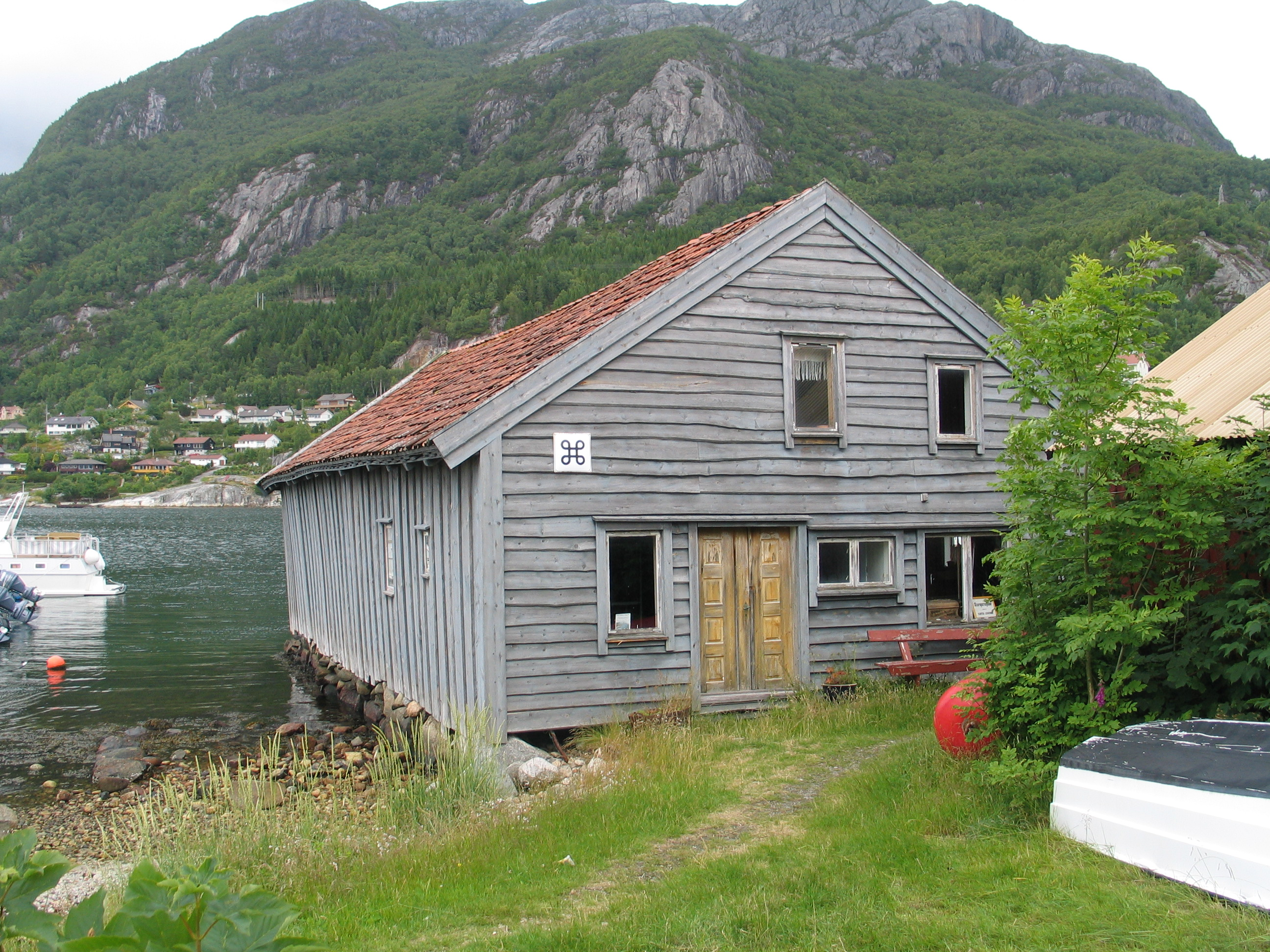 Sjøhuset i Bergevik